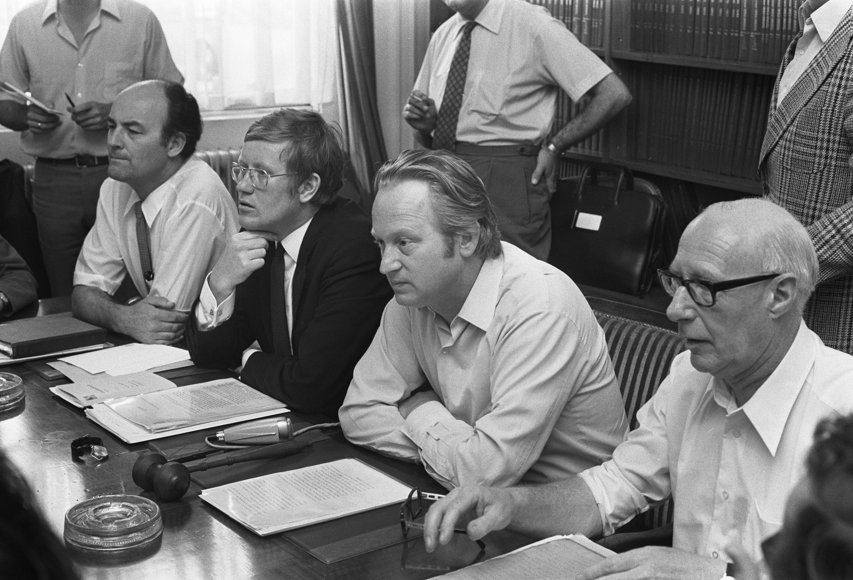 Collectie / Archief : Fotocollectie Anefo Reportage / Serie : [ onbekend ] Beschrijving : Persconferentie van de fractieleiders van de vier overgebleven regeringspartijen; v.l.n.r.: Aantjes (ARP), Wiegel (VVD) Andriessen (KVP) en Tilanus (CHU) Datum : 21 juli 1972 Trefwoorden : persconferenties, politici, regeringscrises Persoonsnaam : Aantjes, Willem, Andriessen, Frans, Tilanus, A.D.W., Wiegel, Hans Instellingsnaam : ARP, CHU Fotograaf : Verhoeff, Bert / Anefo Auteursrechthebbende : Nationaal Archief Materiaalsoort : Negatief (zwart/wit) Nummer archiefinventaris : bekijk toegang 2.24.01.05 Bestanddeelnummer : 925-7585